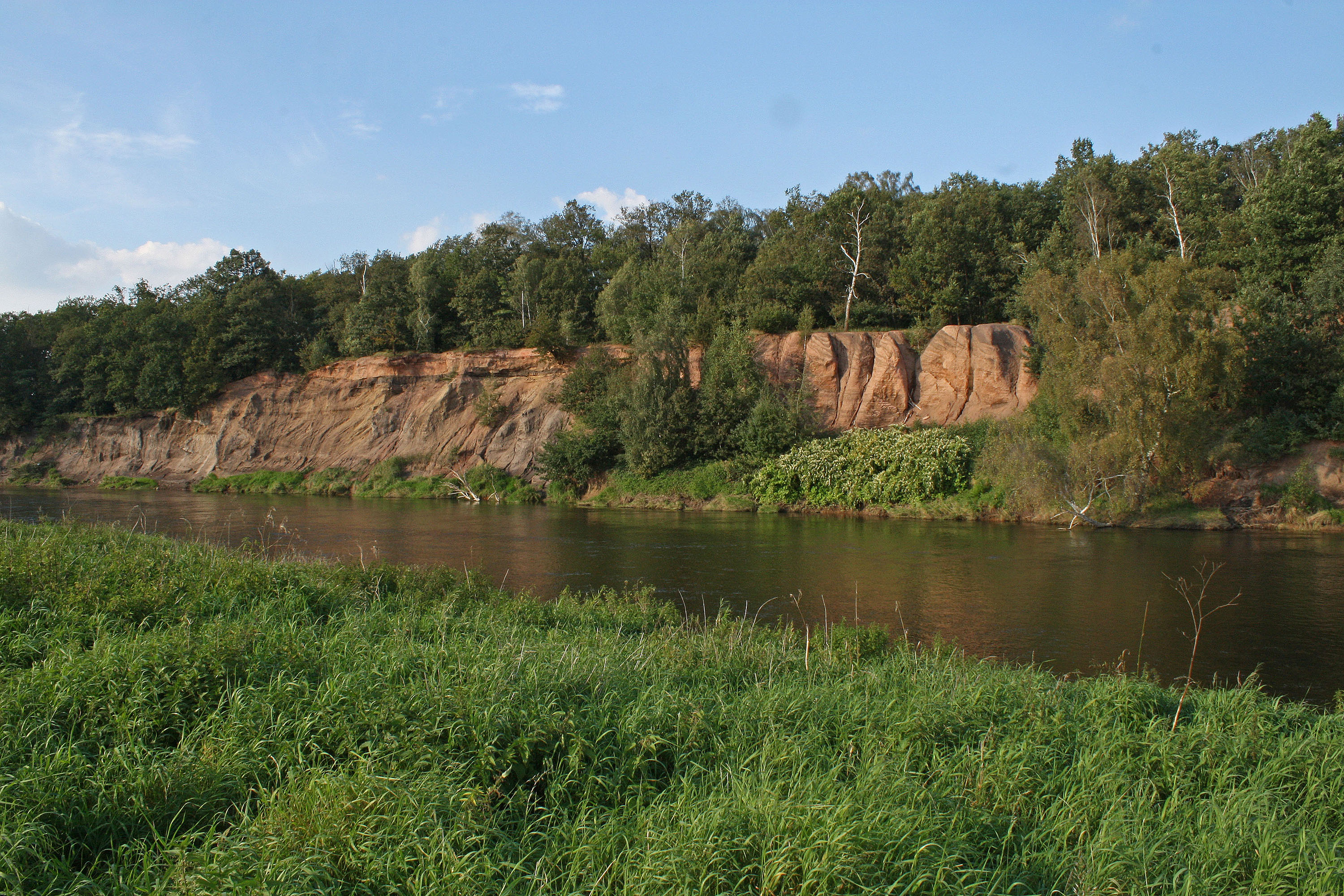 Blick vom gegenüberliegendem Ufer auf das Rote Ufer